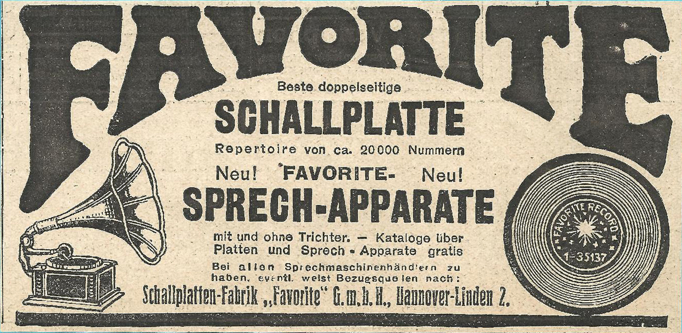 Zeitungsausschnitt einer Annonce der Schallplatten-Fabrik Favorite GmbH aus Hannover-Linden. Unter der Überschrift Favorite und eingerahmt von einem Grammophon sowie einer Schallplatte mit dem Aufkleber Favorite Record und der Nummer 1-35137 findet sich der Text „Beste doppelseite Schallplatte / Repertoire von ca. 20000 Nummern / Neu! Favorite- / Neu! Sprech-Apparate / mit und ohne Trichter. - Kataloge über Platten und Sprechapparate gratis / Bei allen Sprechmaschinenhändlern zu haben, eventl. weist Bezugsquellen nach ...“ ...